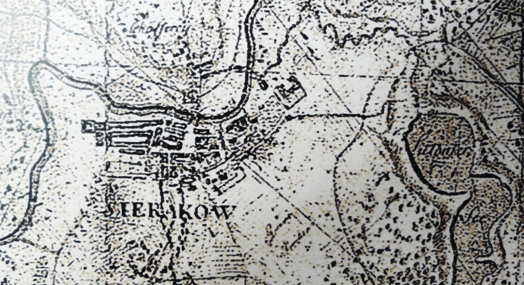 Mapa okolic Sierakowa z 1770r.